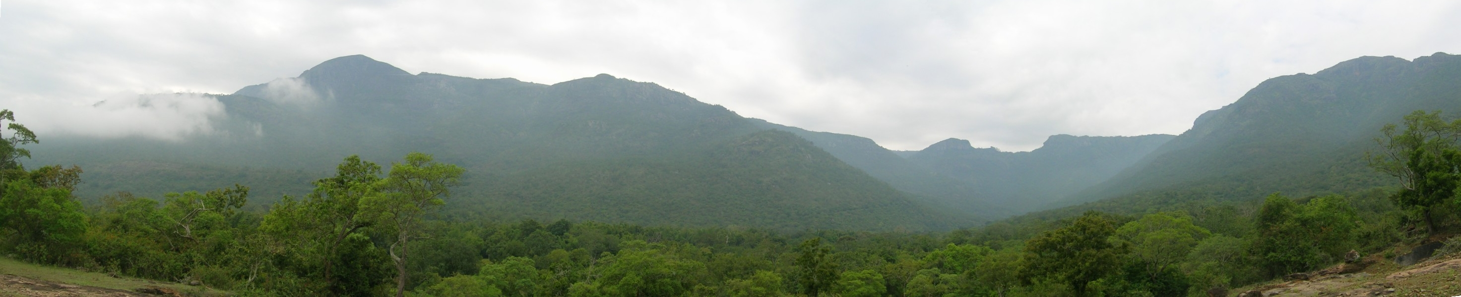 Sigur ghat from the Mudumalai Sigur plateau, Nilgiris, Tamilnadu